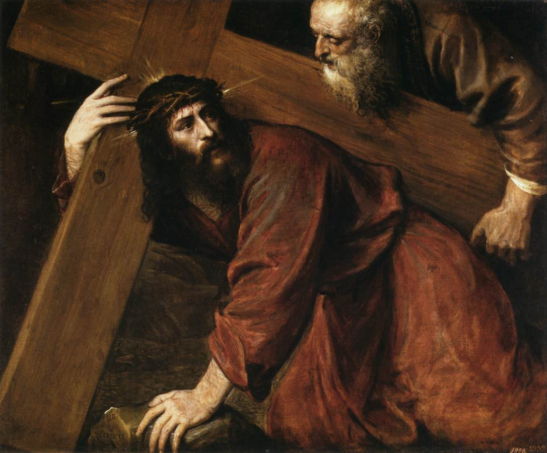 La obra representa a Jesucristo cargando con la cruz en la que sería crucificado y dirigiéndose hacia el monte Calvario.